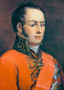 Dimitri Dachkov (1784 —1839 )